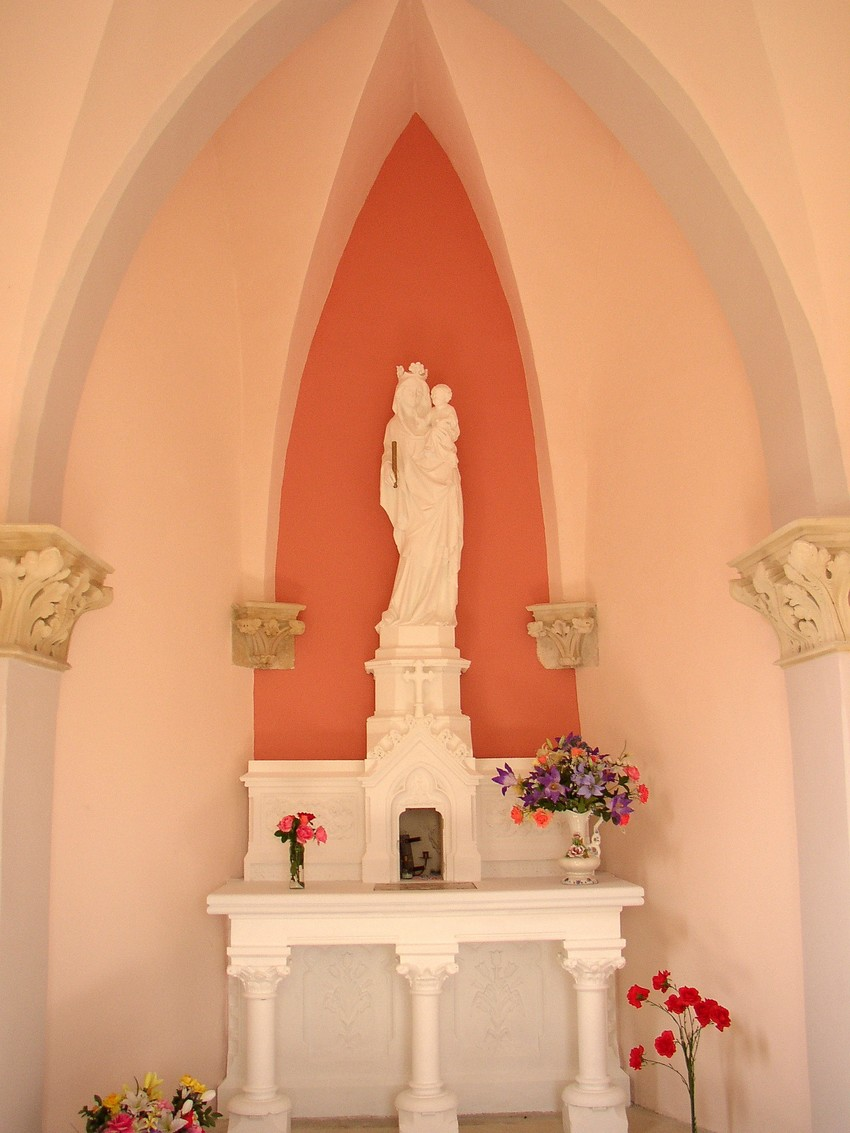 Intérieur de la chapelle de Vaux Navier; Arc-sous-Cicon; Doubs